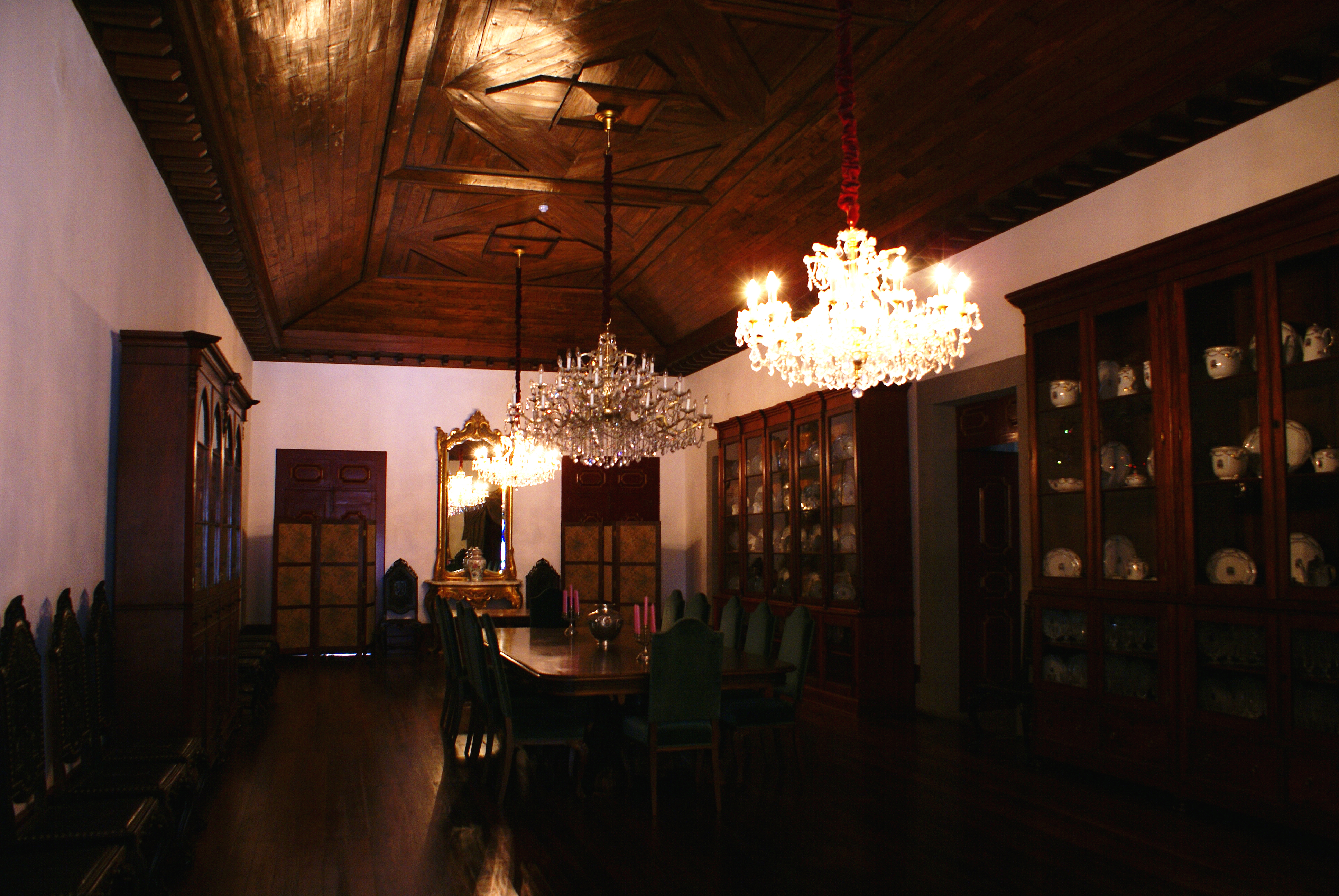 Palácio dos Capitães Generais, uma sala de jantar, Angra do Heroísmo, ilha Terceira, Açores